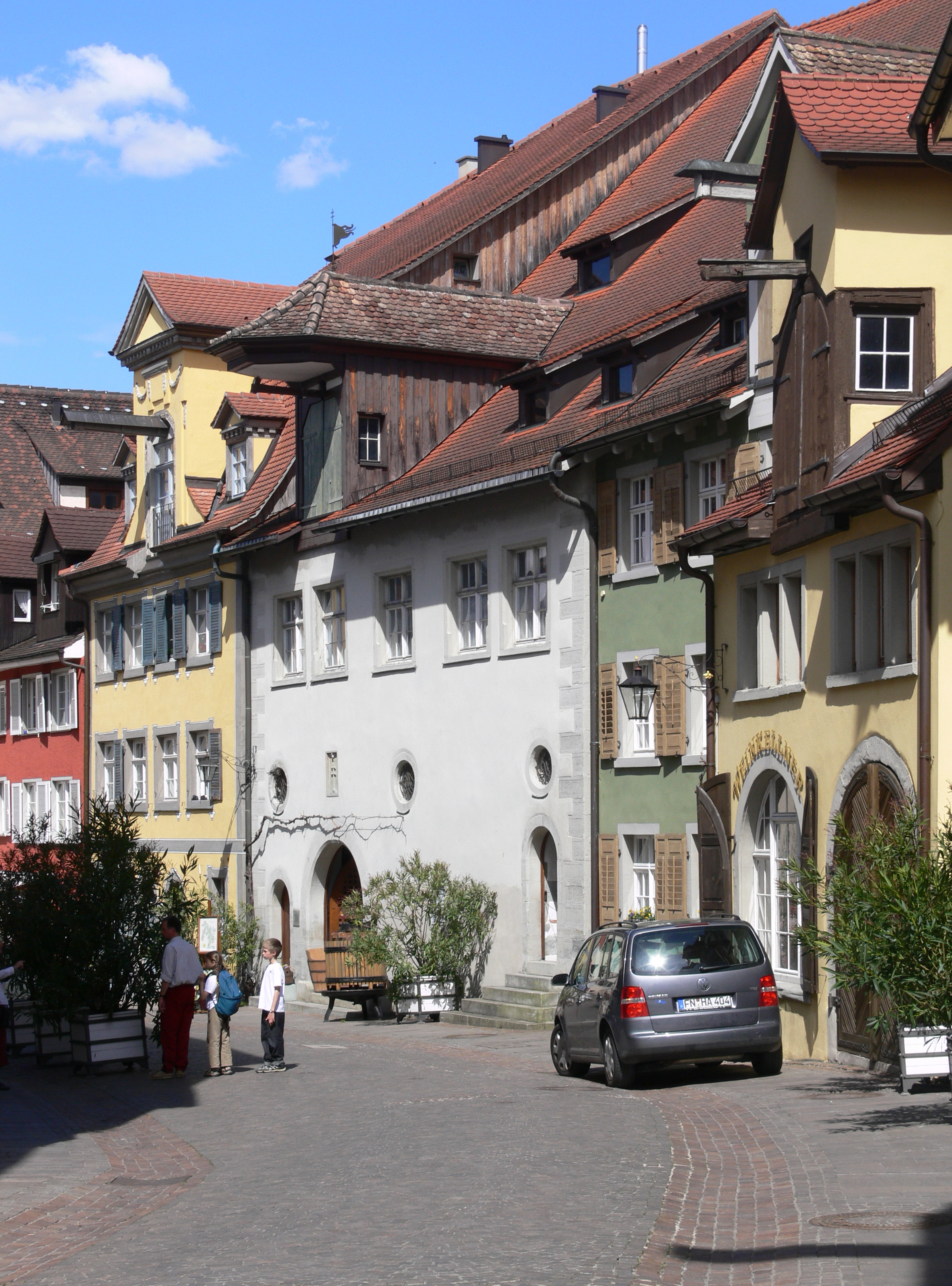 Meersburg, Bodenseekreis Vorburggasse